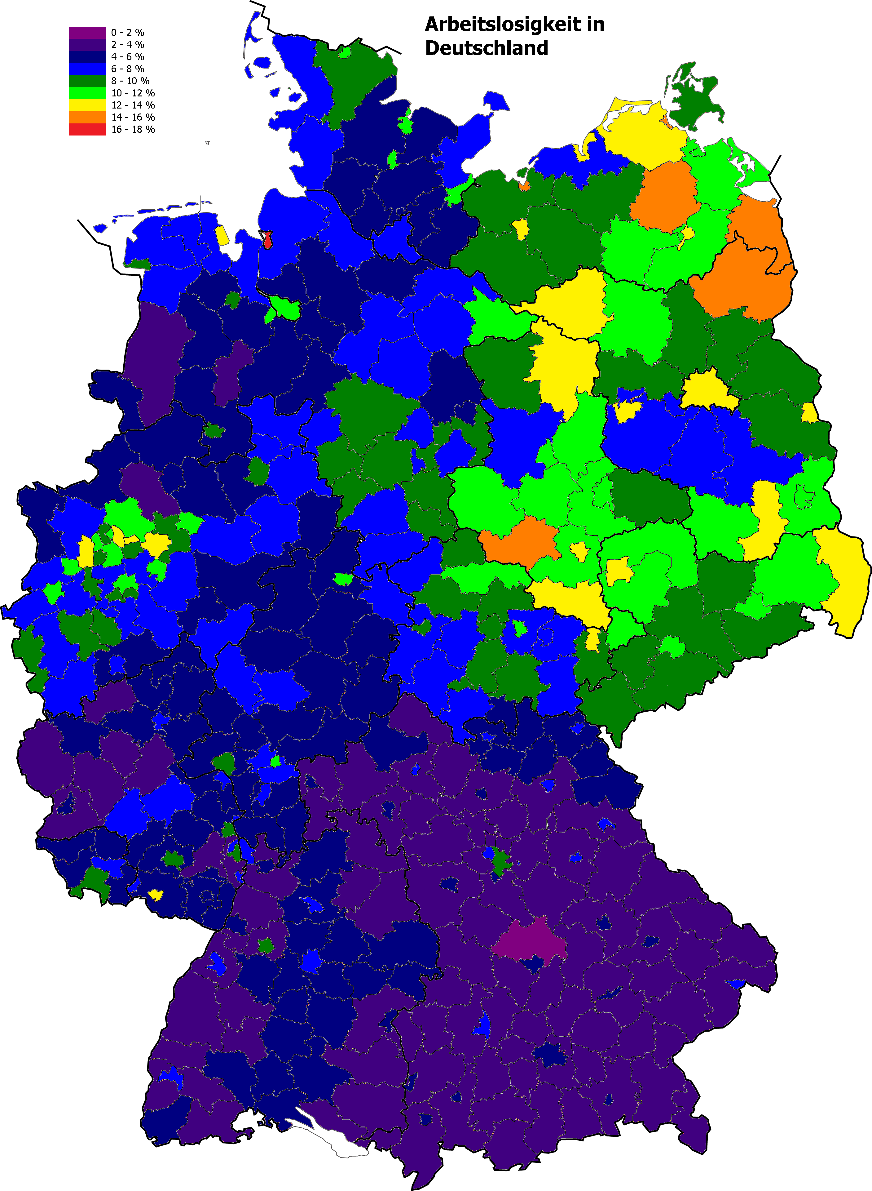 Arbeitslosenquoten nach Kreisen im Oktober 2010. 0-2% 2-4% 4-6% 6-8% 8-10% 10-12% 12-14% 14-16% 16-18%